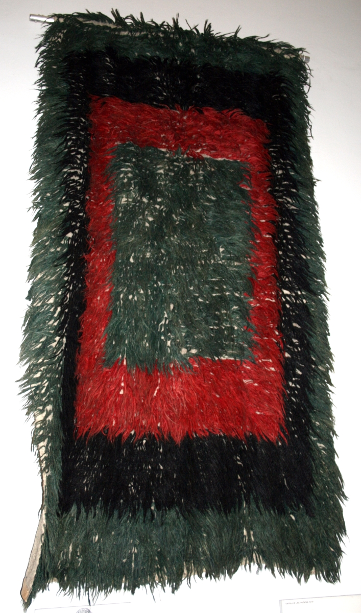 snimljeno tijekom Noći muzeja u Etnografskom muzeju u Zagrebu